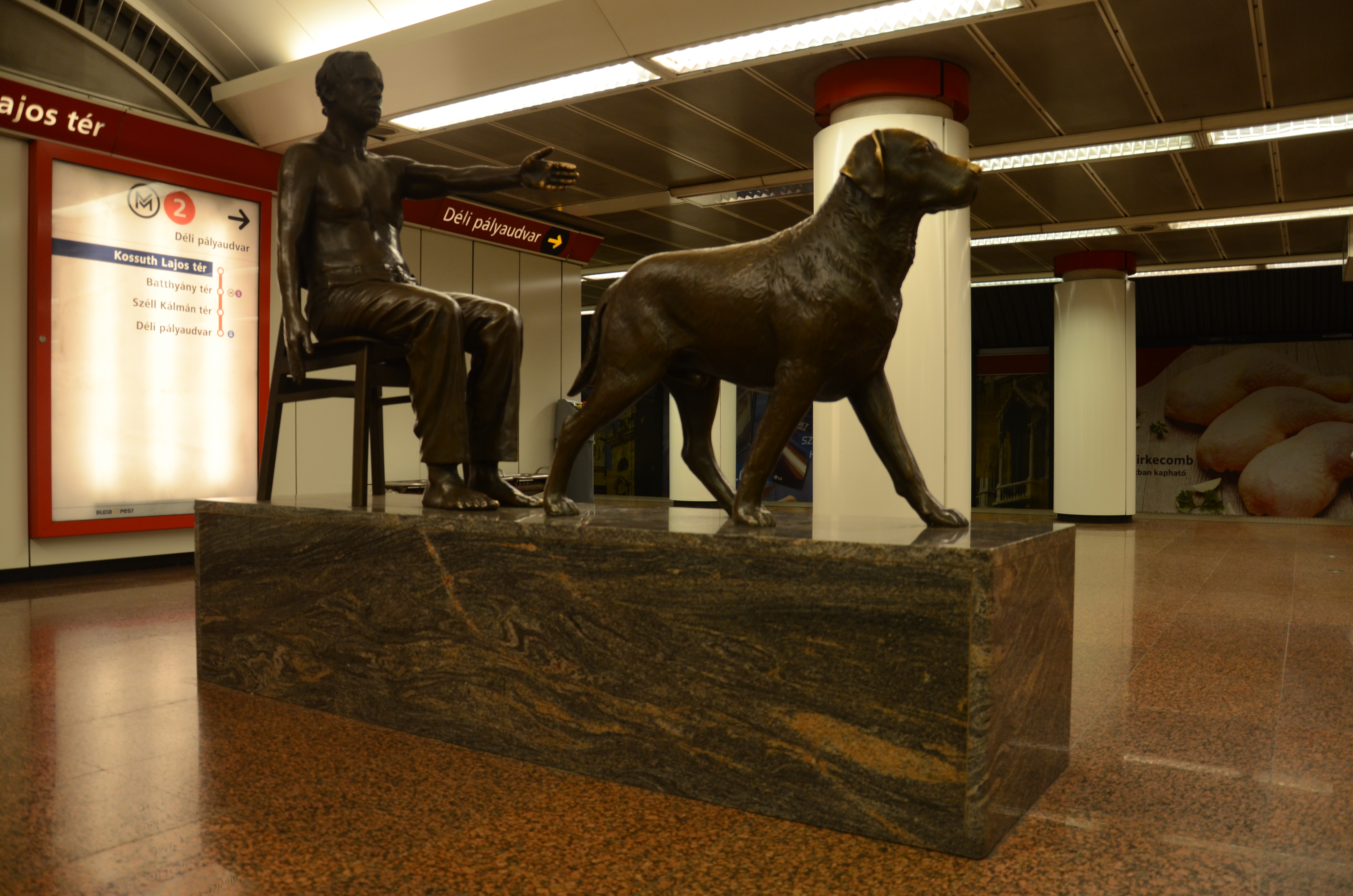 Een standbeeld op een metrostation in Boedapest.